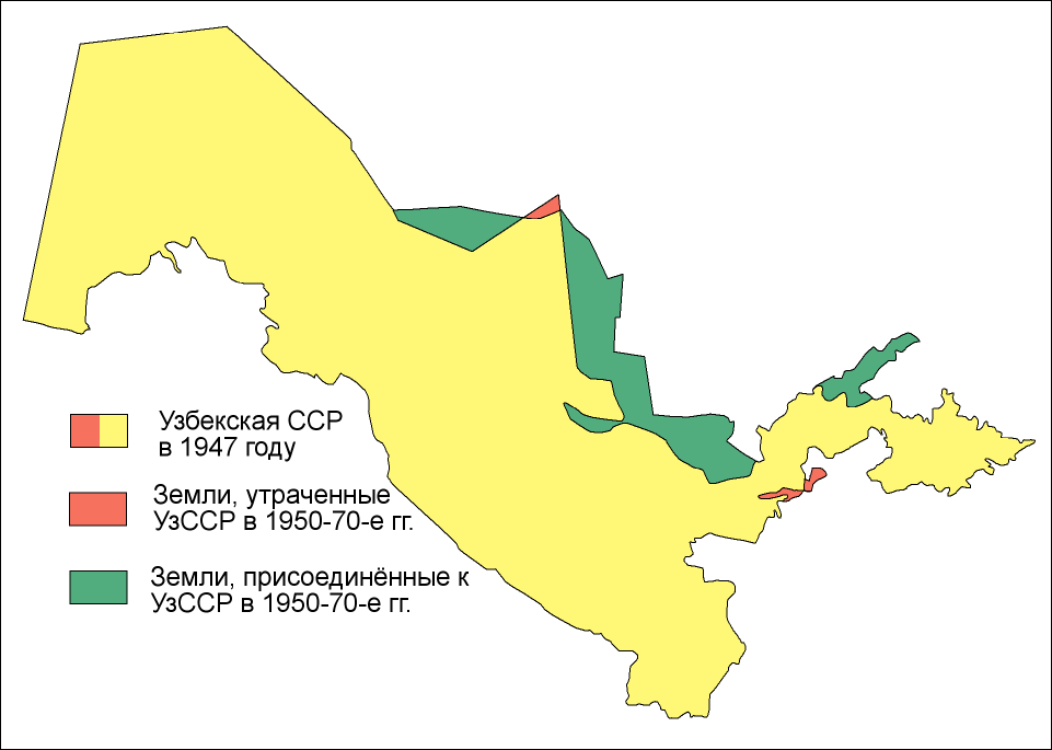 Изменение границ Узбекистана в 1950-60-е гг.